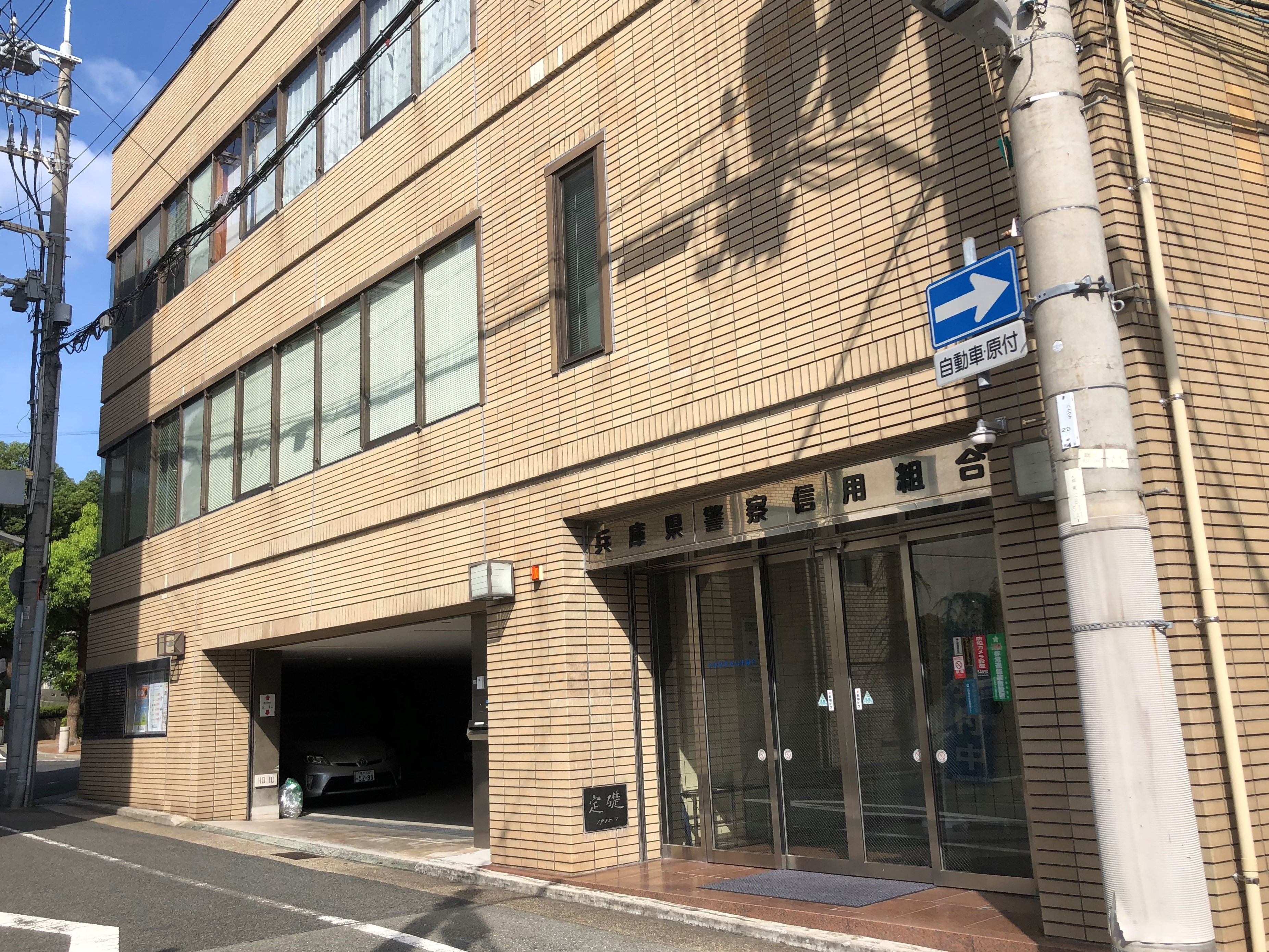 兵庫県警察信用組合